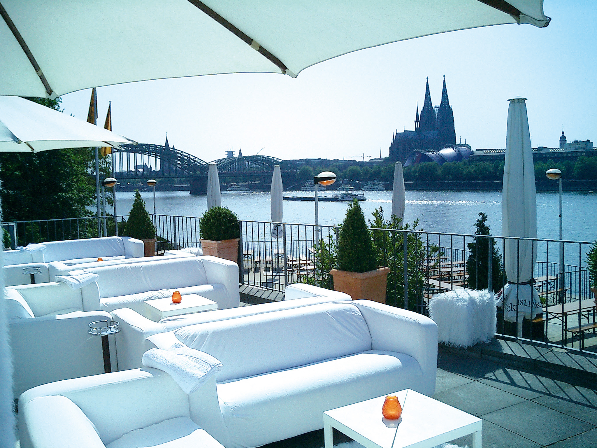 Rheinterrassen mit weissem Sofa